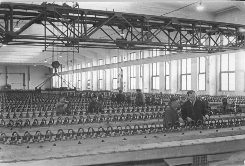 Zentralbild-Schmidt Ted 7.12.1953 Ra-Wi. Sag-Betrieb-Buna. Mit einem Telegramm wandten sich die Arbeiter und Angestellten des Sag-Betriebes Buna in Schkopau an die Belegschaft des Kunstfaserwerkes "Wilhelm Pieck". Schwarza. Sie erklärten darin ihre Bereitschaft,das Jahr 1954 zum Jahr der großen Initiative werden zu lassen,es durch neue Produktionsleistungen vorzubereiten,und den Jahresplan bis zum 26.12.1953 zu erfüllen.Der Sag-Betrieb Buna wurde mit Hilfe der sowjetischen Leitung auf den höchsten Stand der Technik gebracht. In den mächtigen Hallen der Natronlaugefabrik stehen Zellen,in denen aus Kochsalzlösung mit Hilfe von Energie Natronlauge hergestellt wird,die für die Verantwortung von Textilien notwendig ist,1420 Tonnen bis Ende des Jahres über den Plan hinaus erzeugen. UBz: Dr.Eckardt (im Vordergrund rechts) und der Verdiente Aktivist Grunert bei einer Besprechung. Im Hintergrund eine Montagepartie,die eine Zelle mit neuen Anoden ausrüsten. "